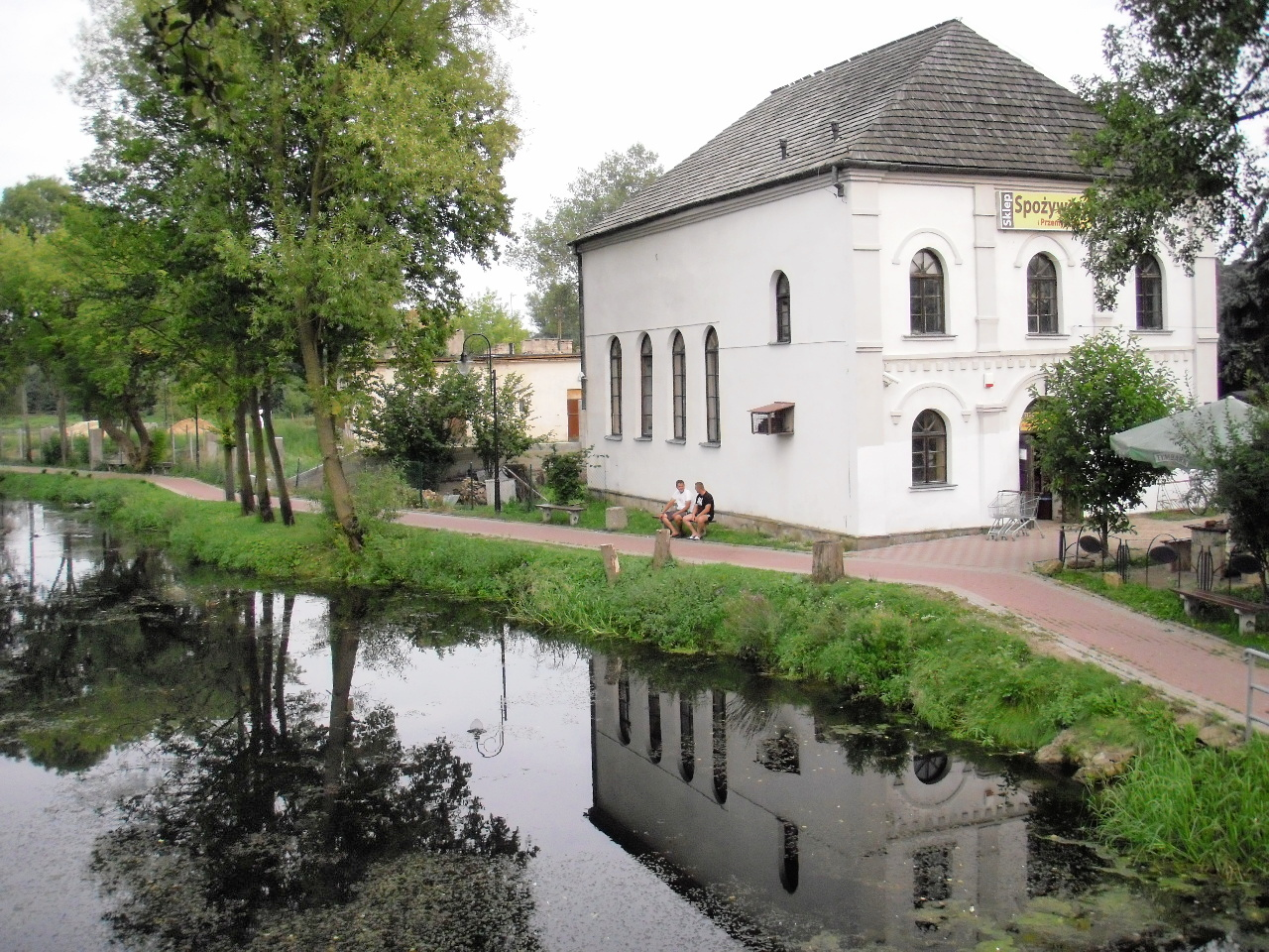 Inowłódz, synagoga, ob. biblioteka, pocz. XIX, 1975-1980